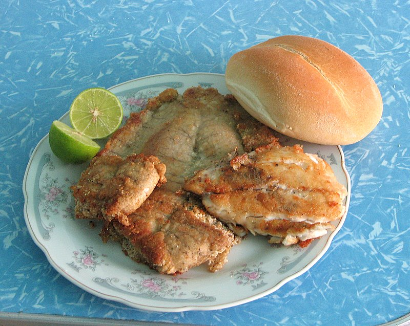 Me estoy acostumbrando de nuevo a desayunos más contundentes. En este caso, huevera y chita, con mi limoncito y pan francés, y jugo de durazno Watts (ese día todavía no había ido por mi yogur de lúcuma).